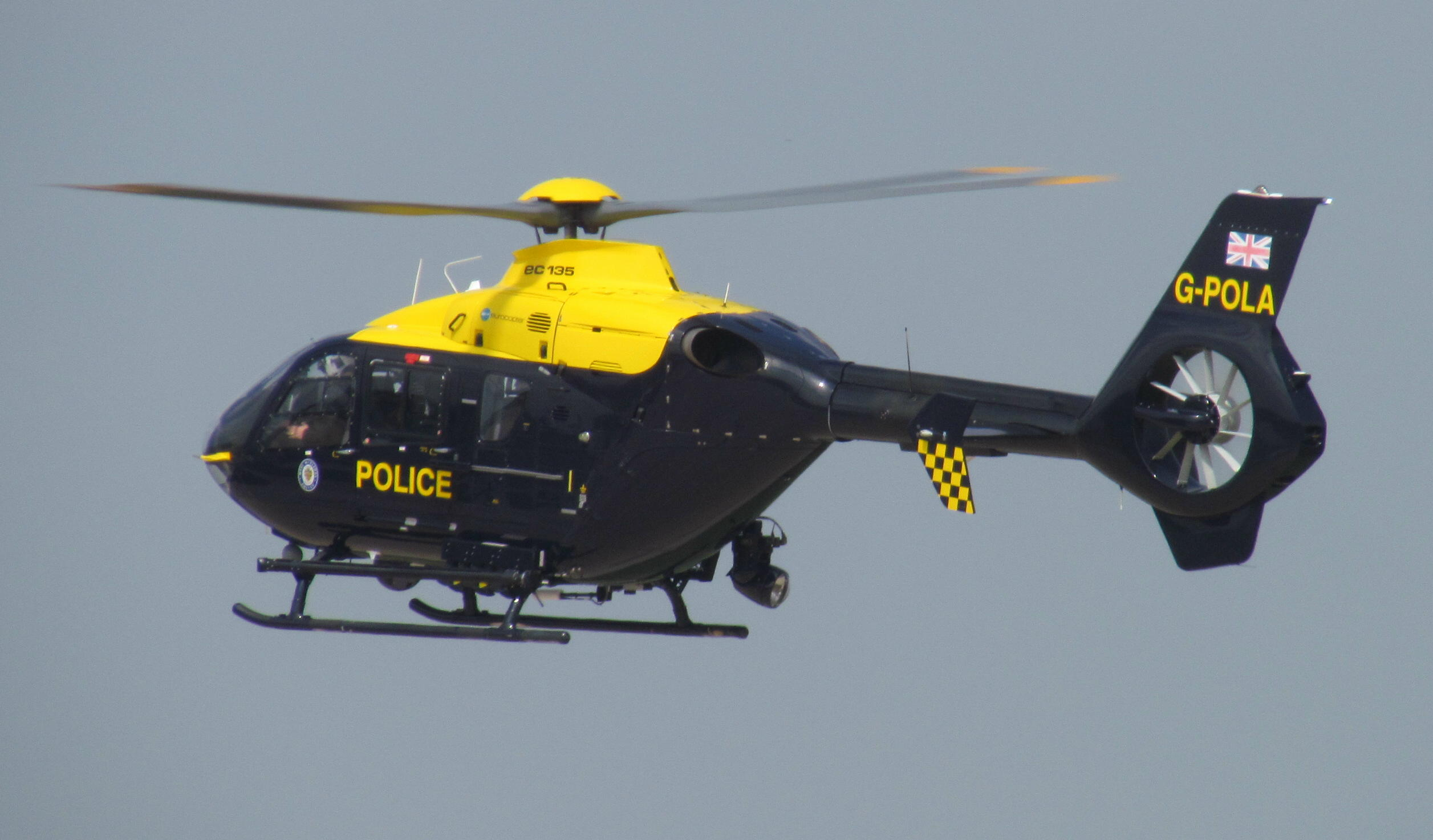 G-POLA